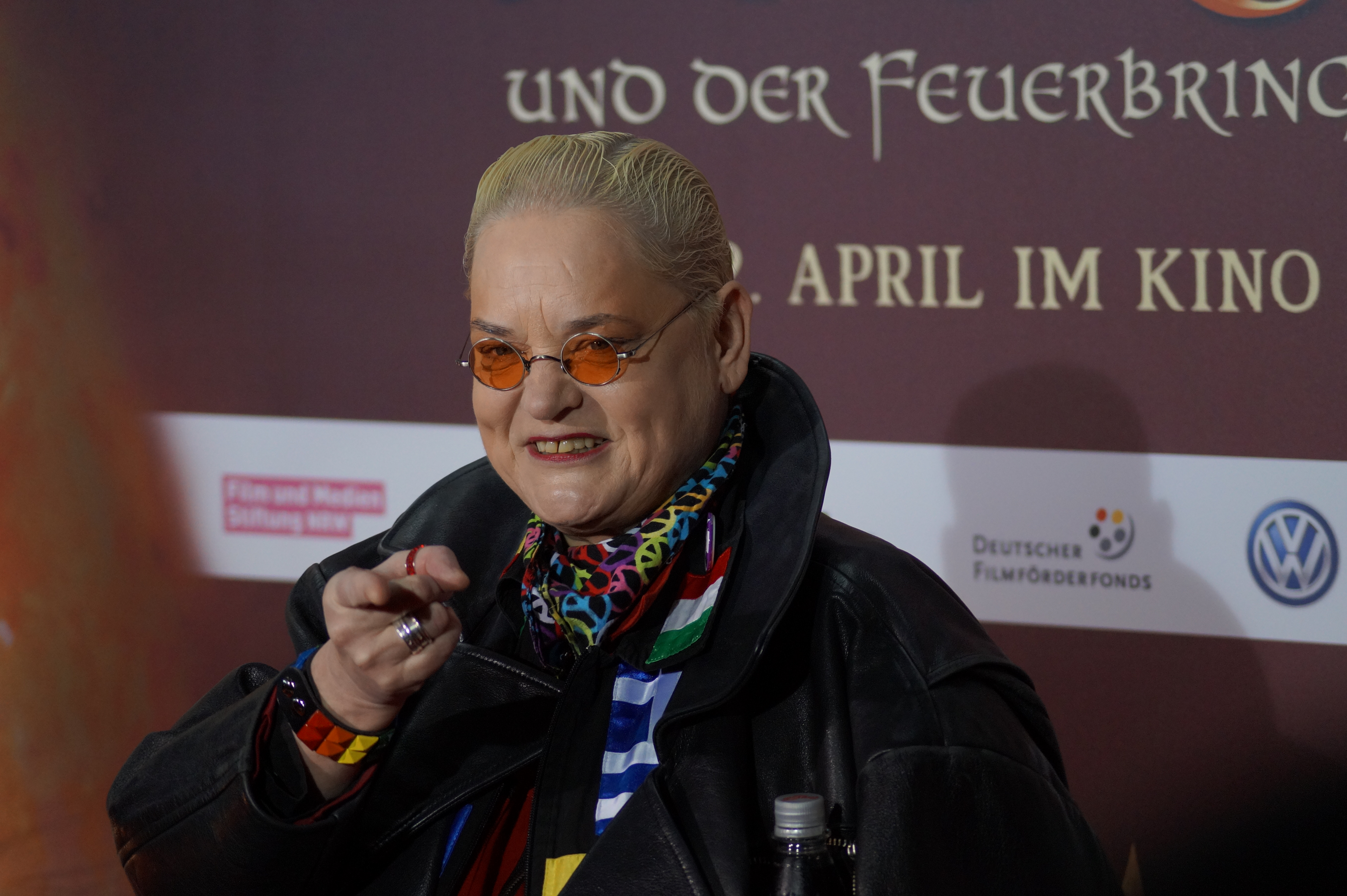 Hella von Sinnen bei der Deutschlandpremiere von "Mara und der Feuerbringer", am 29. März 2015, im Cinedom Köln